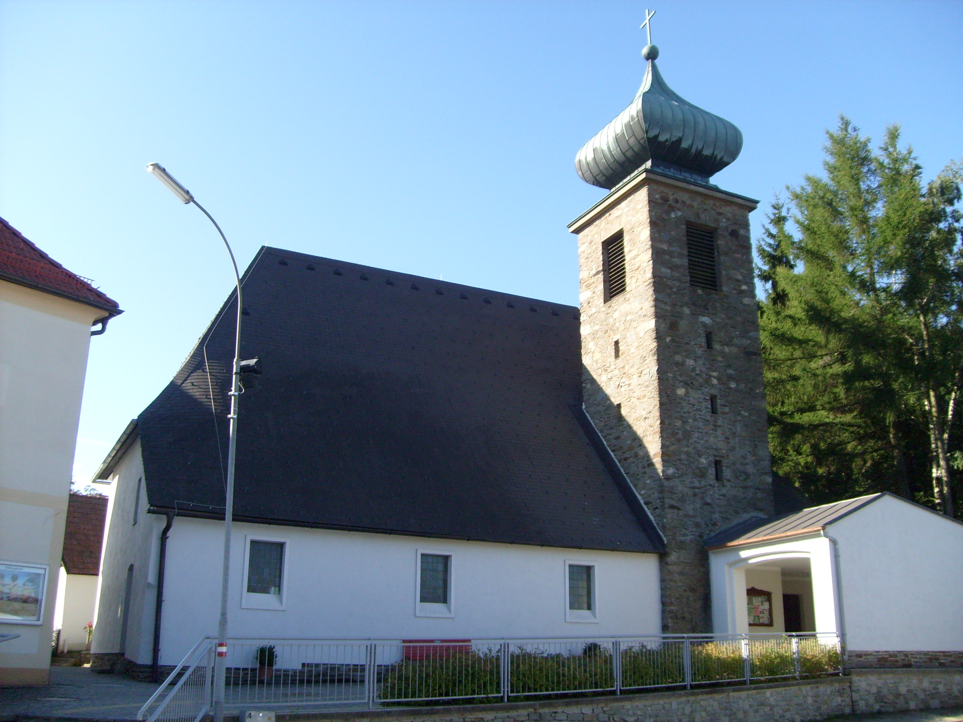 Kath. Filialkirche hl. Magdalena in Gschaidt